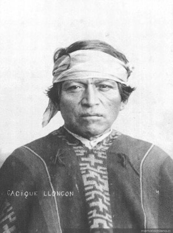 Lonco mapuche Lloncon, ca. 1890